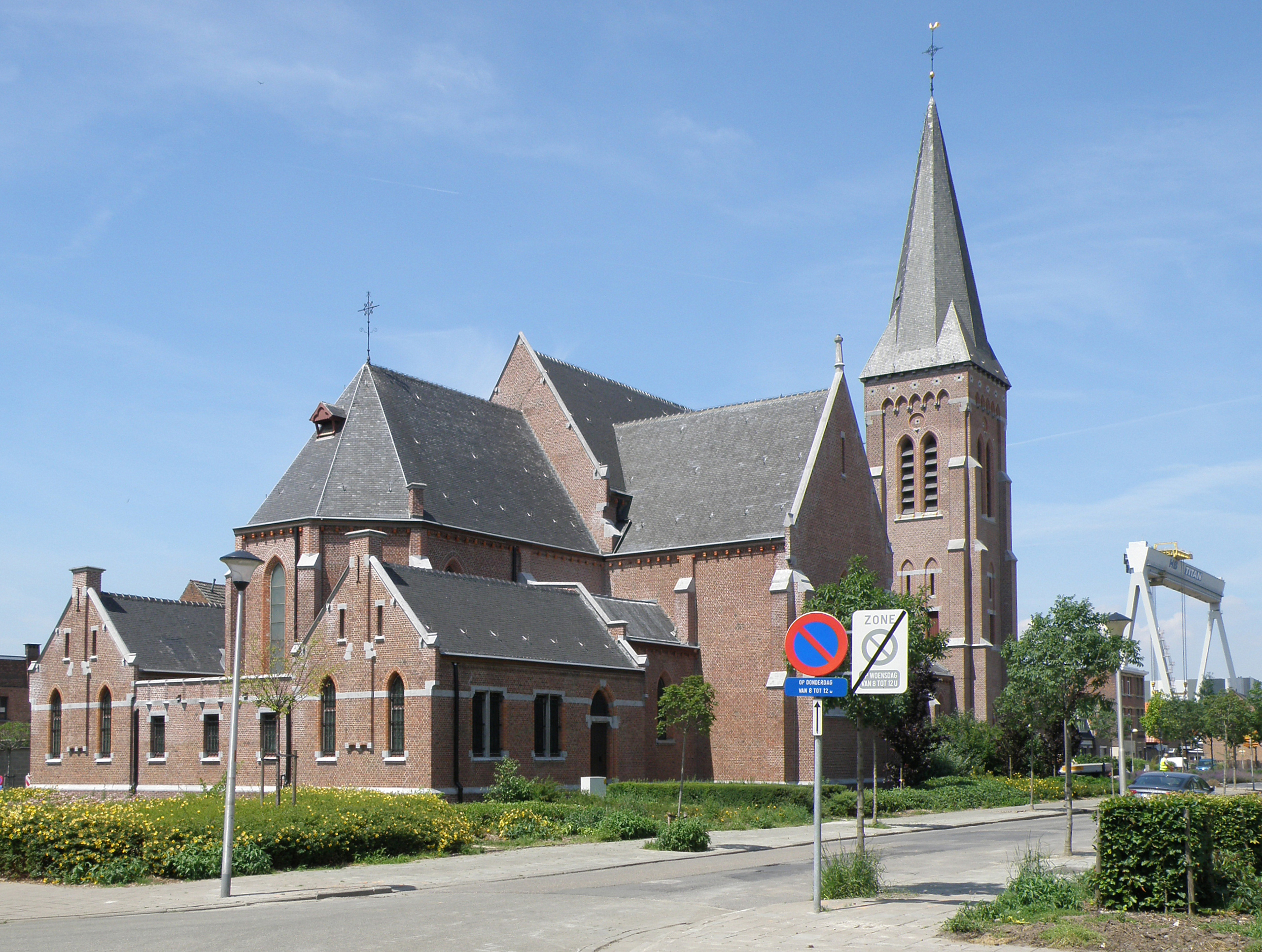 Antwerpen, district Hoboken (België). Sint--Jozefkerk, in de Moretuswijk.